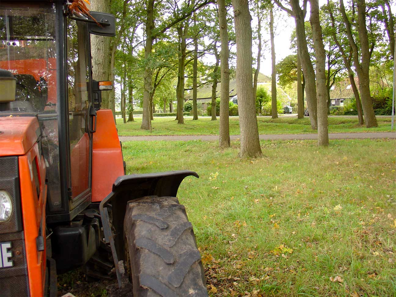 De brink van Taarlo in Drenthe